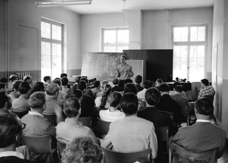 Juli 1957 12. Internationale Ferienkurse für neue Musik, Darmstadt Seminar: Karl Heinz Stockhausen